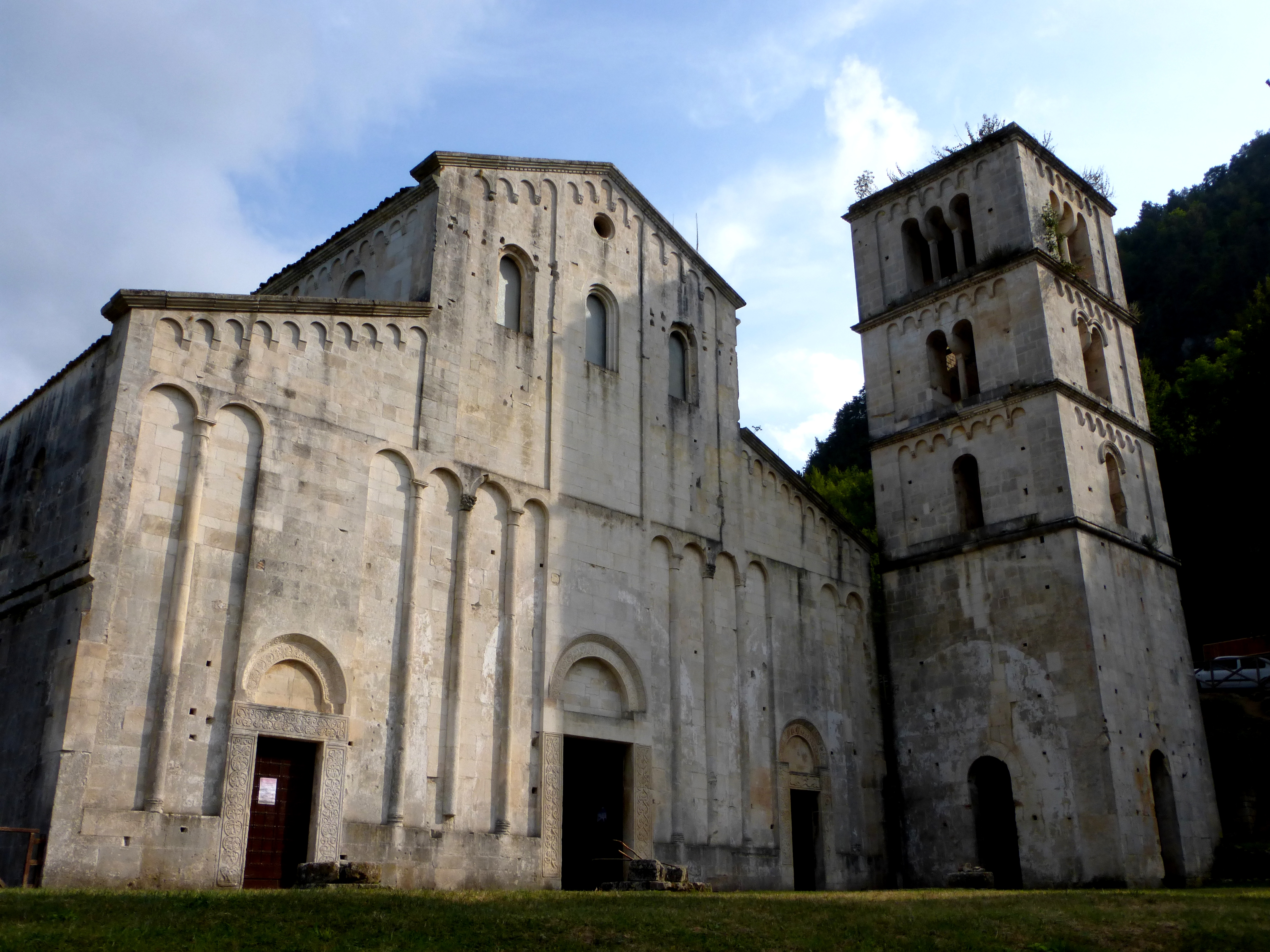 San Liberatore a Majella, Serramonacesca, Pescara.